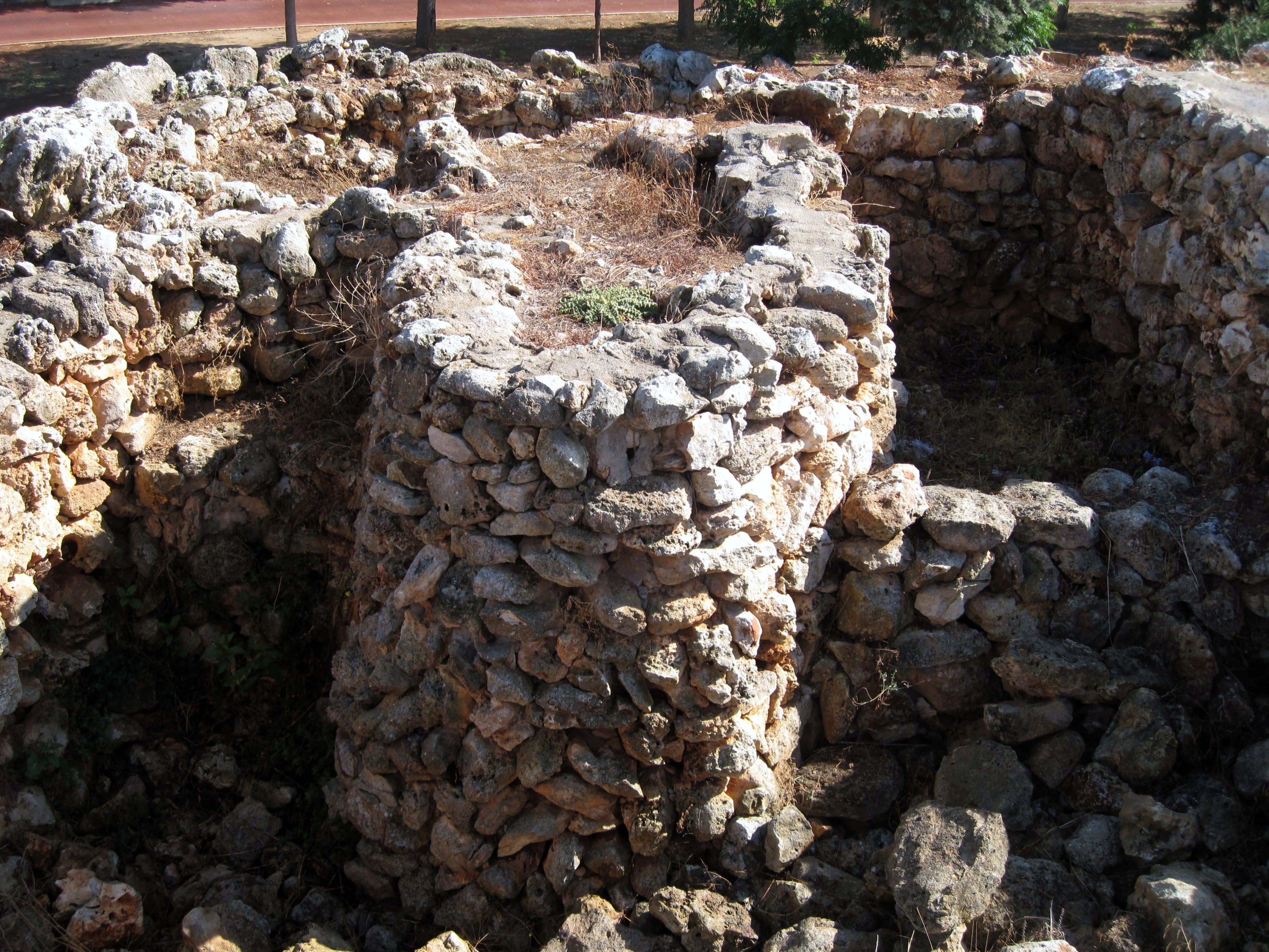 Zentralmonument auf der obersten Ebene des talaiotischen Dorfes von S’Illot (Poblat talaiòtic de s’Illot), Gemeinde Sant Llorenç des Cardassar, Mallorca, Spanien